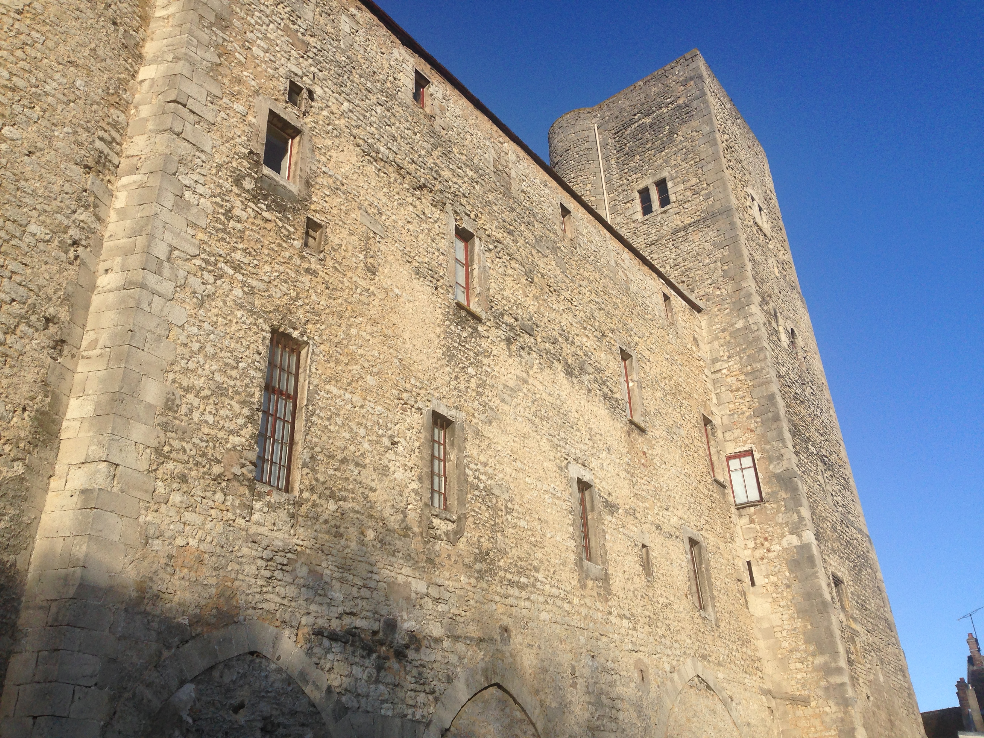 Château de Nemours côté Loing